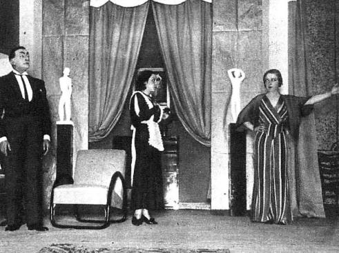 Escena del estreno de la obra de teatro Usted tiene ojos de mujer fatal, del dramatugo español Enrique Jardiel Poncela